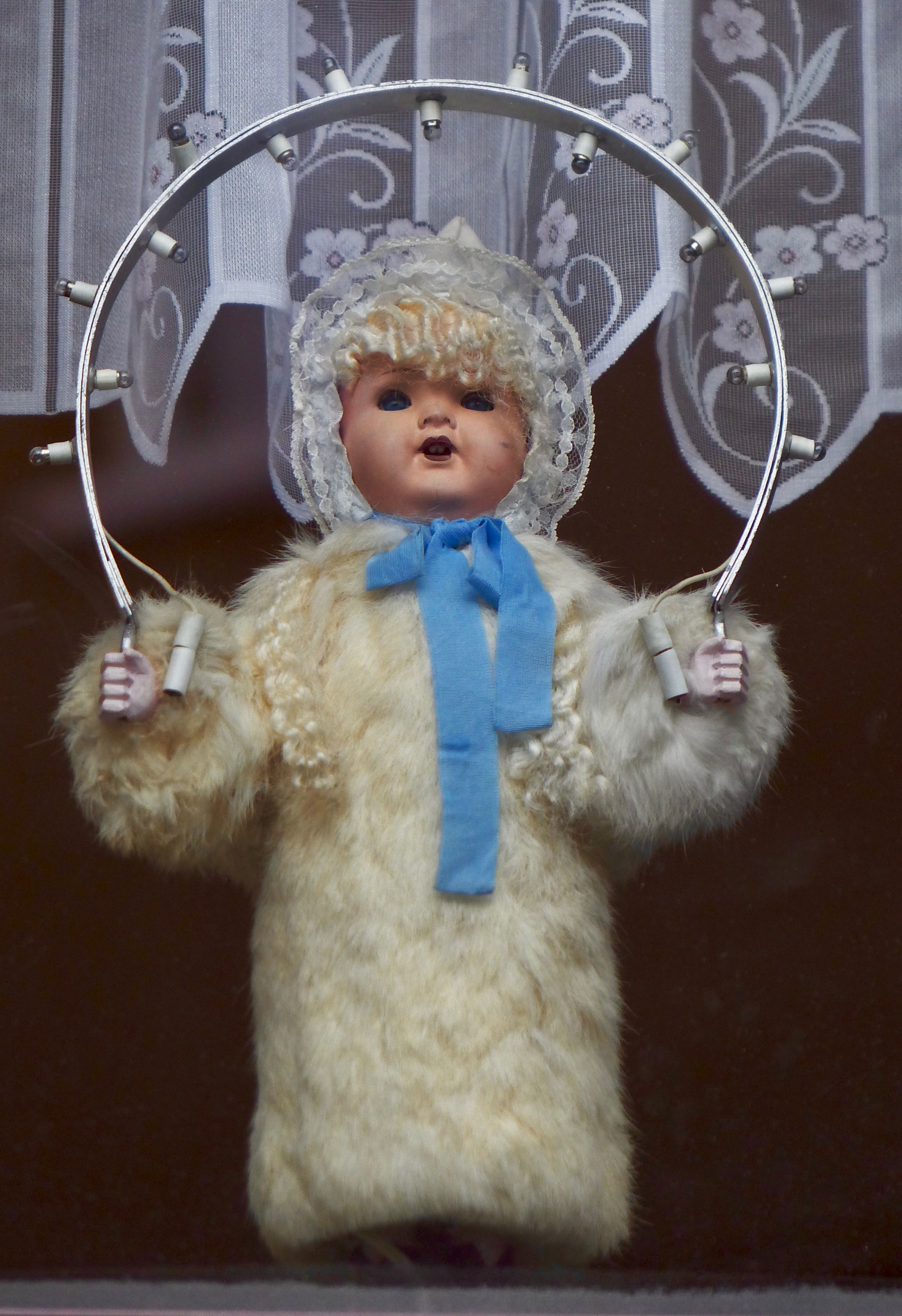 Lichterpuppen als Weihnachtsdekoration in den Fenstern in Crottendorf